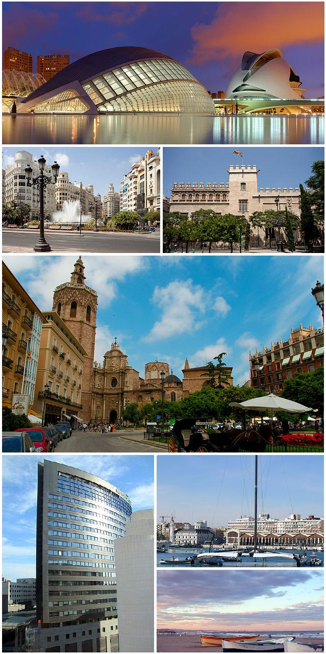 Collage con imágenes de los enclaves más representativos de la ciudad de Valencia.